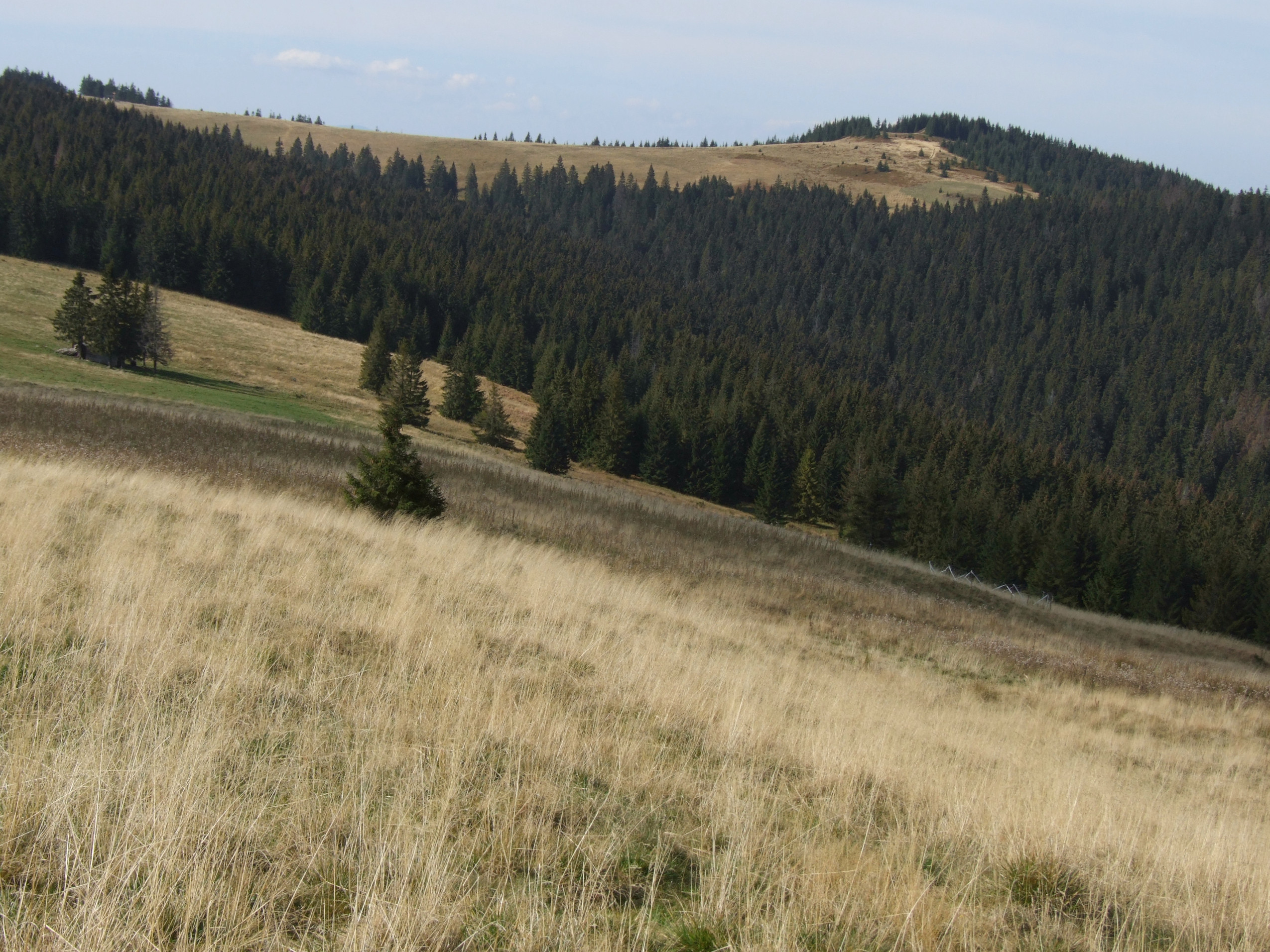 Hala Długa pod Turbaczem (Polana Wzorowa). Widok na Halę Turbacz